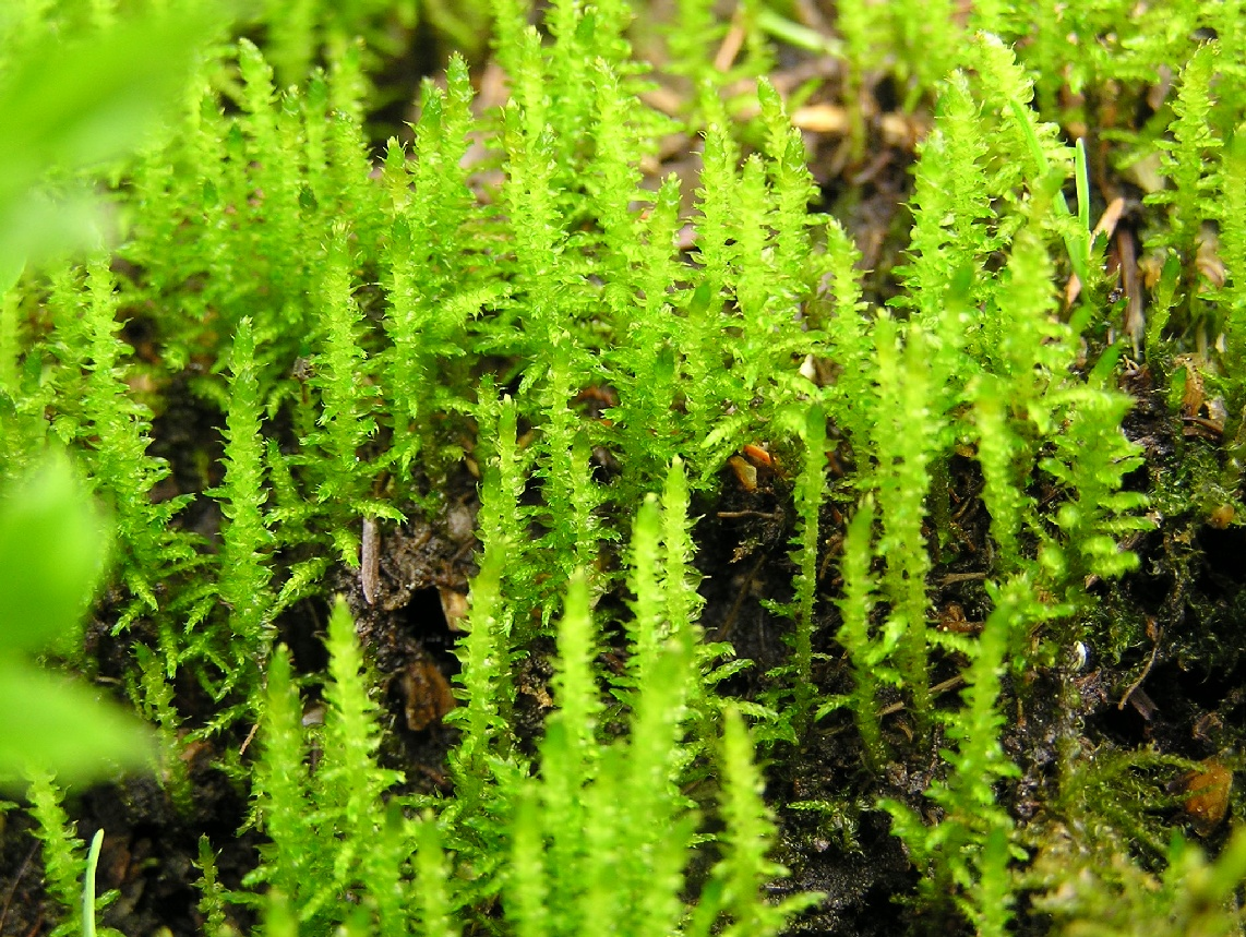 Cratoneuron commutatum an einer nassen Stelle am Krippenstein in den österreichischen Kalkalpen.